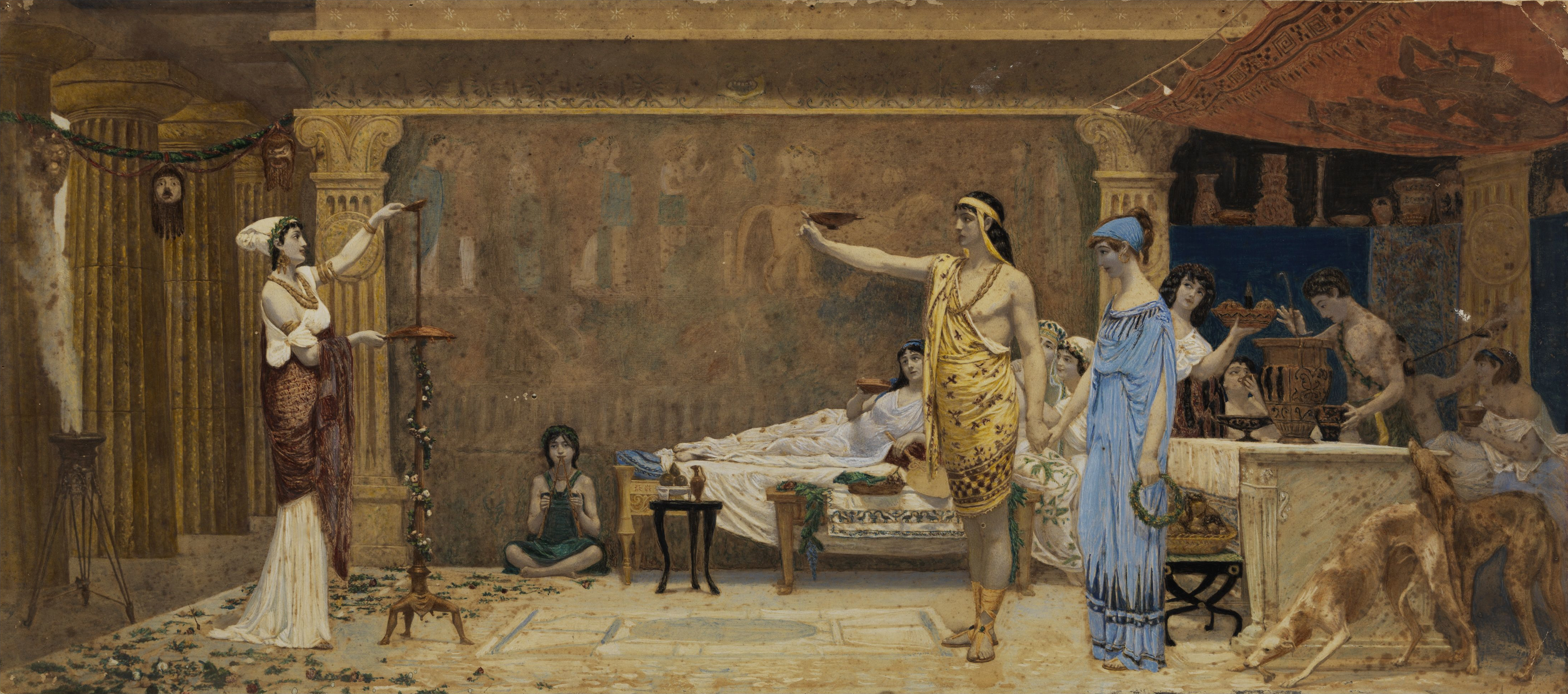 Cottabo. Mischtechnik auf Karton. 24,5 x 55 cm. Rechts unten signiert und ortsbezeichnet "A. Scifoni Roma". Verso bezeichnet und betitelt von anderer Hand "A. Scifoni Il Cottabo". Cottabo ist ein Trinkspiel der griechischen Antike.